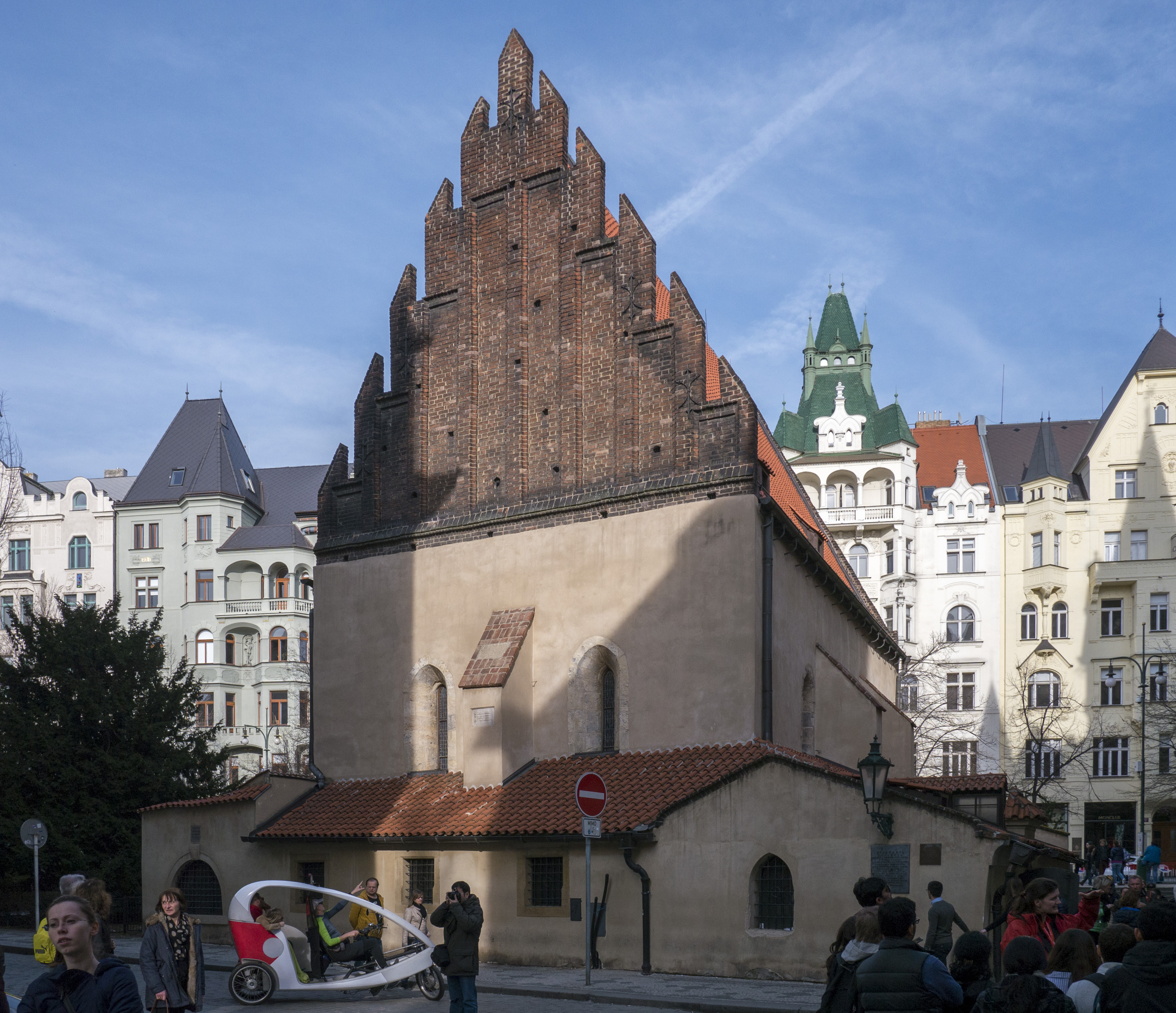 Prag Altneu Synagoge